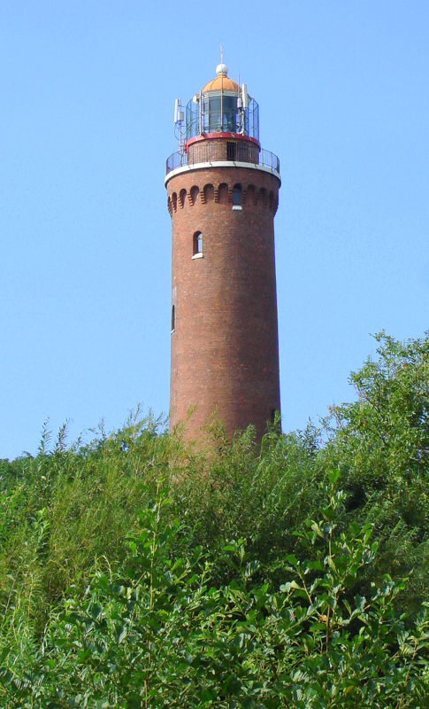 Gąski, latarnia morska, 1876-1878